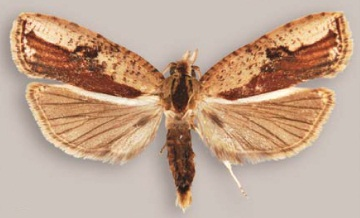 Sparganocosma docsturnerorum